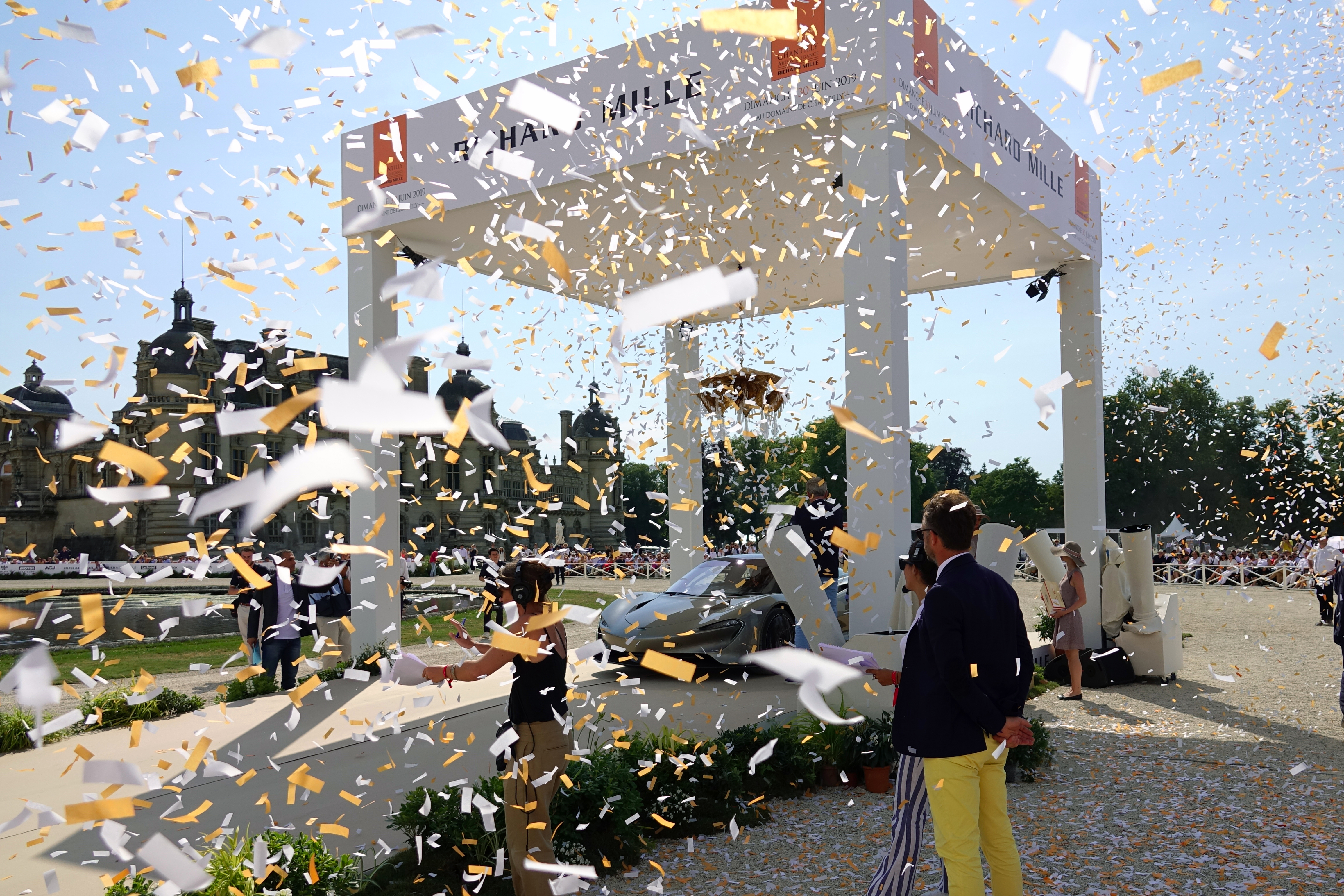 McLaren Speedtail au Chantilly Arts & Elegance Richard Mille 2019